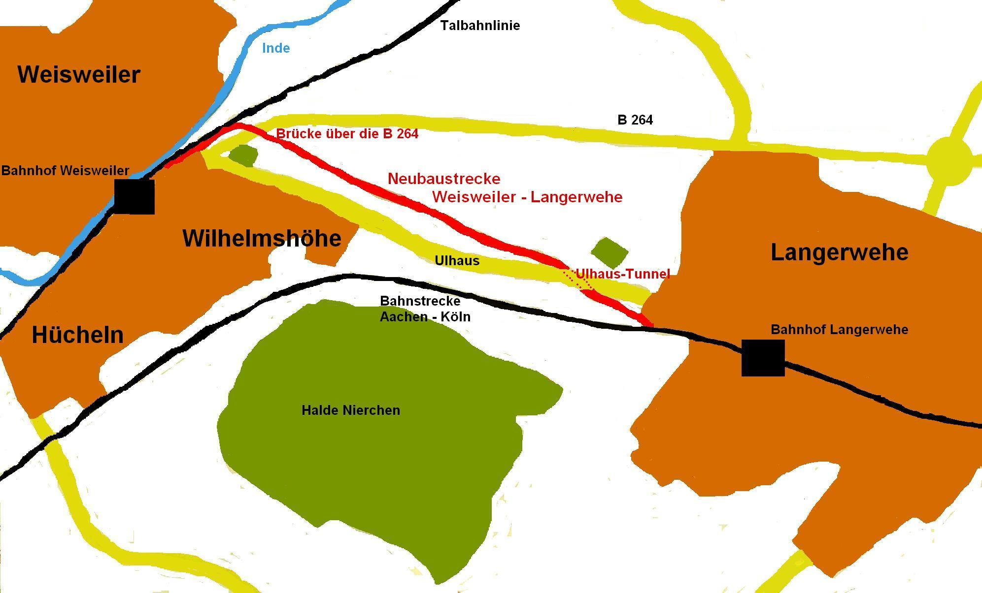 Neubaustrecke zwischen Bahnhof Weisweiler (Eschweiler) und Bahnhof Langerwehe (Langerwehe im Kreis Düren)